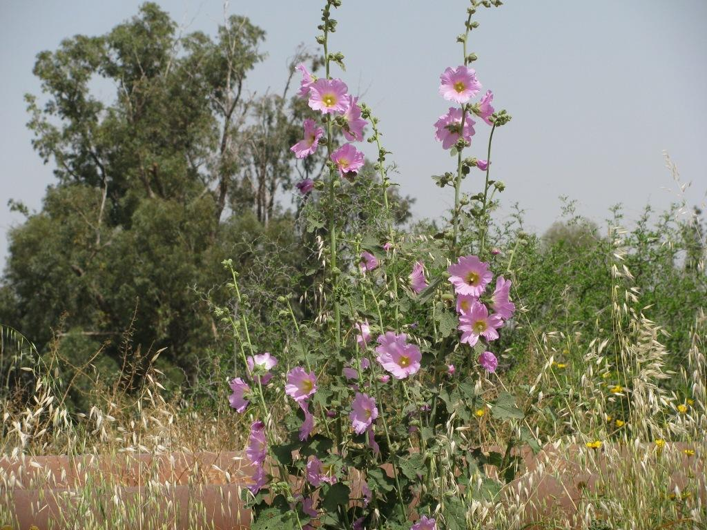 פריחת החוטמית בשדות שליד הסחנה בחודש אפריל. "צעדת המעיינות"